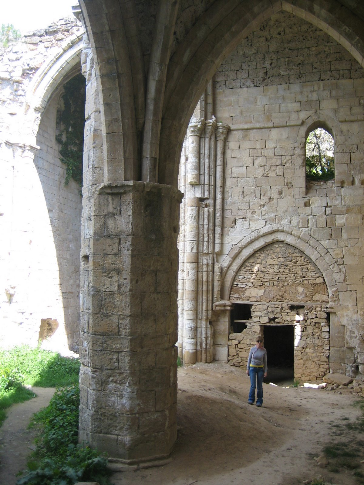 Monasterio de Bonaval situado en el municipio español de Retiendas (Guadalajara).